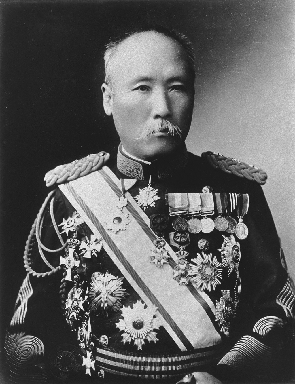 Portrait of Fukushima Yasumasa (福島安正, 1852 – 1919)